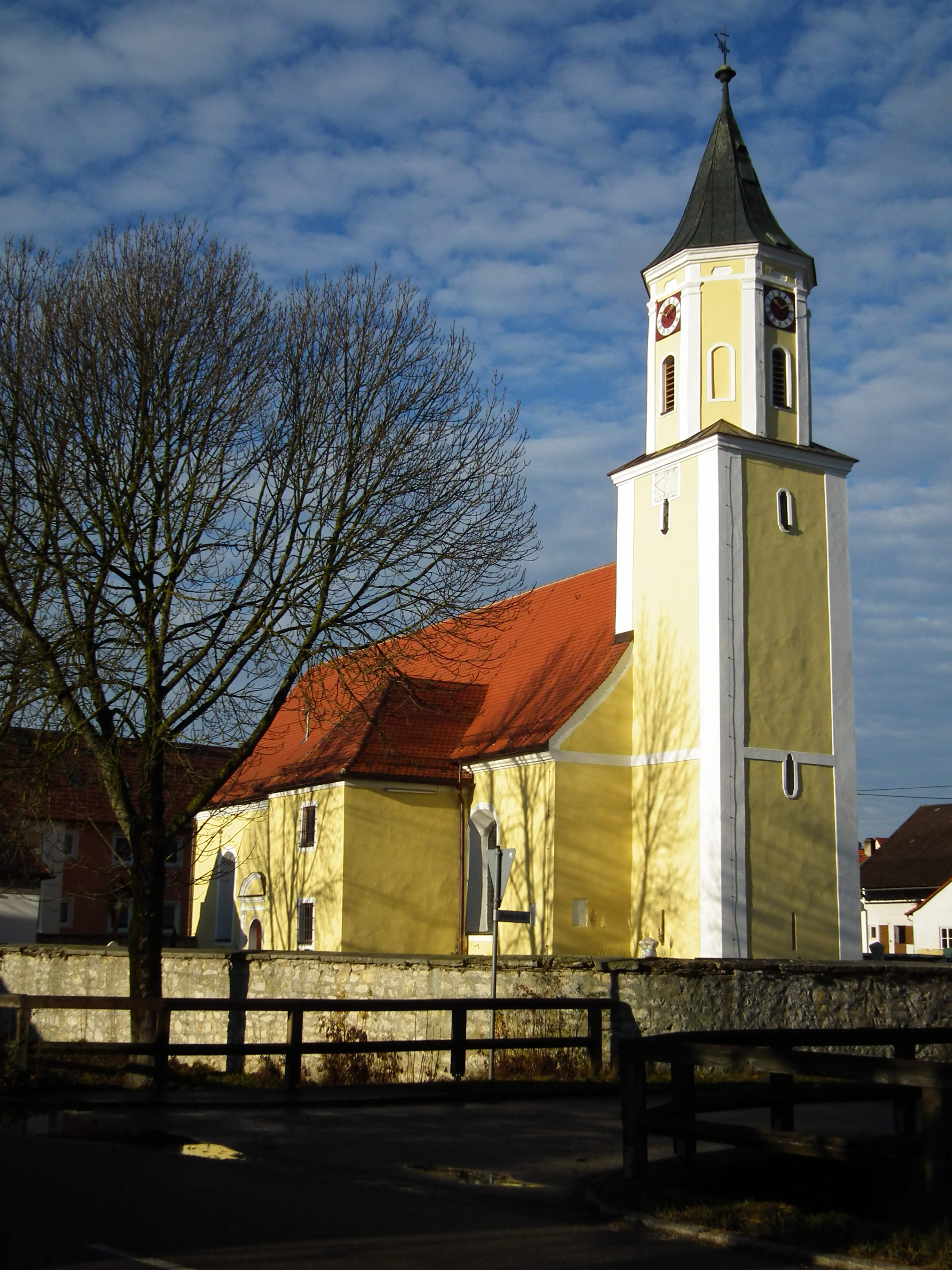 Ottinger Gotteshaus, dem Schutzheiligen St. Richard geweiht (Landkreis Donau-Ries, Bayern, Deutschland)